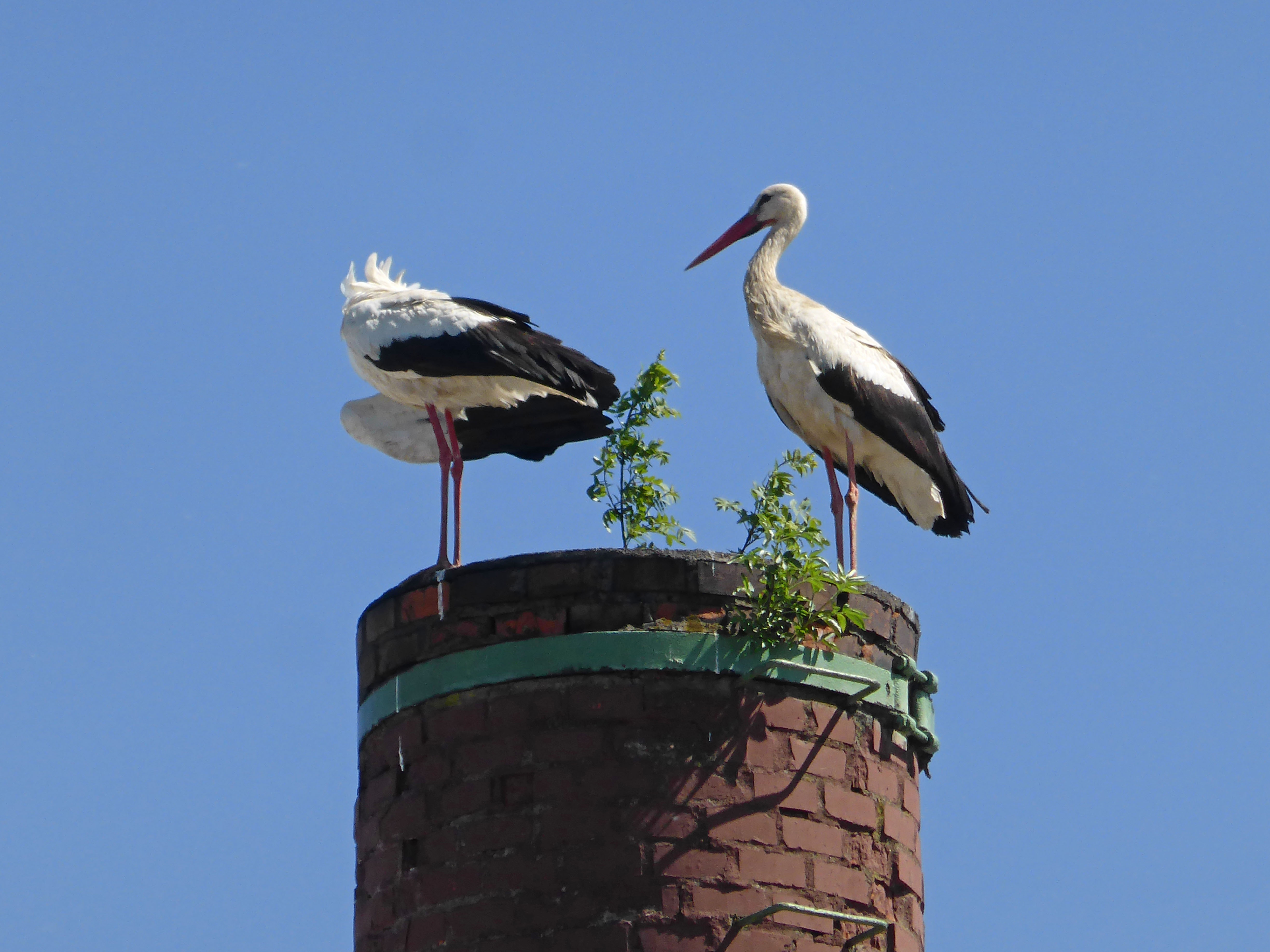 Storchennest auf dem Schornstein der ehemaligen Molkerei in Parsau.